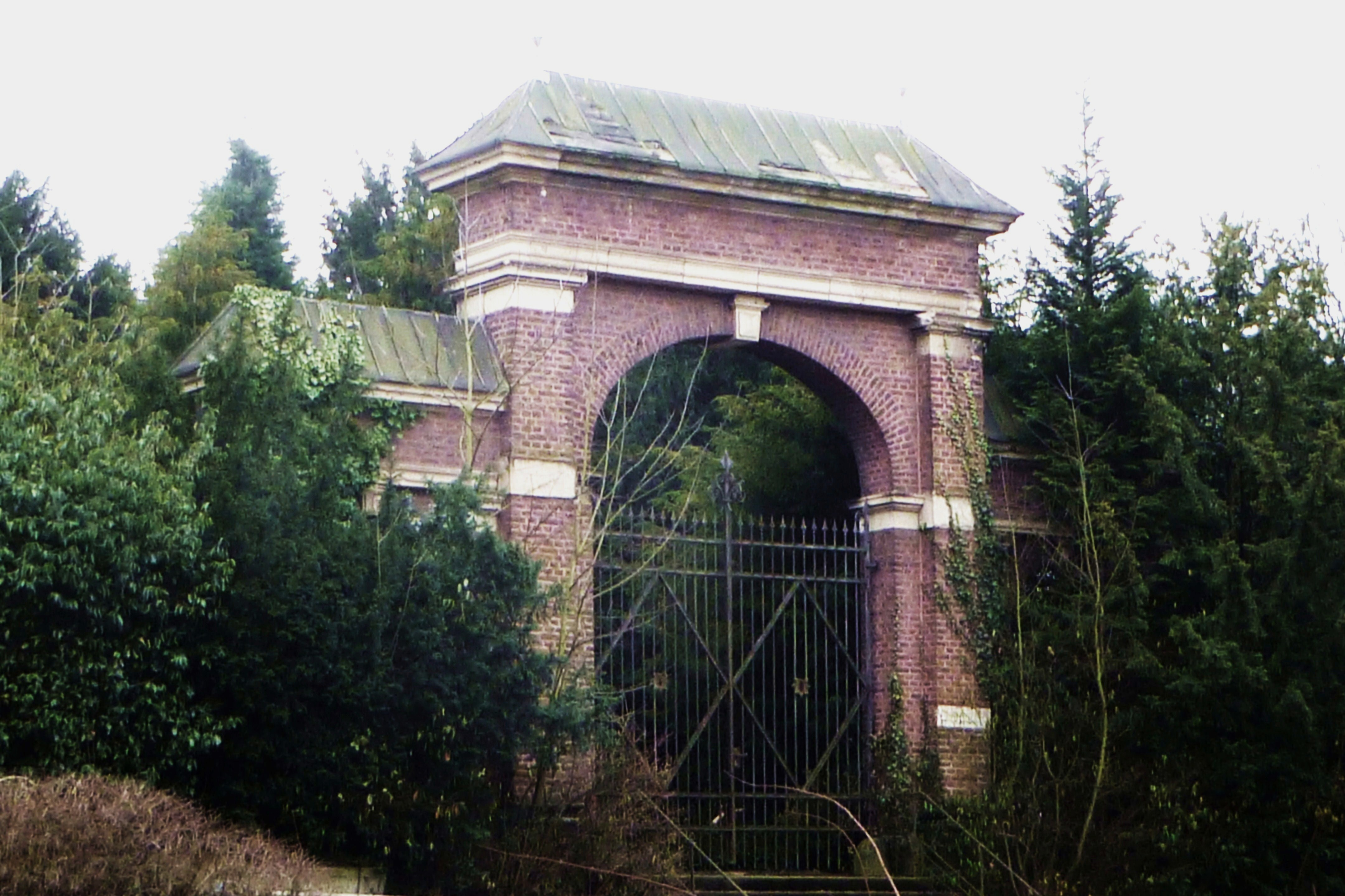 Alter Haupteingang am Westfriedhof I in Aachen